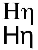 greek letter eta